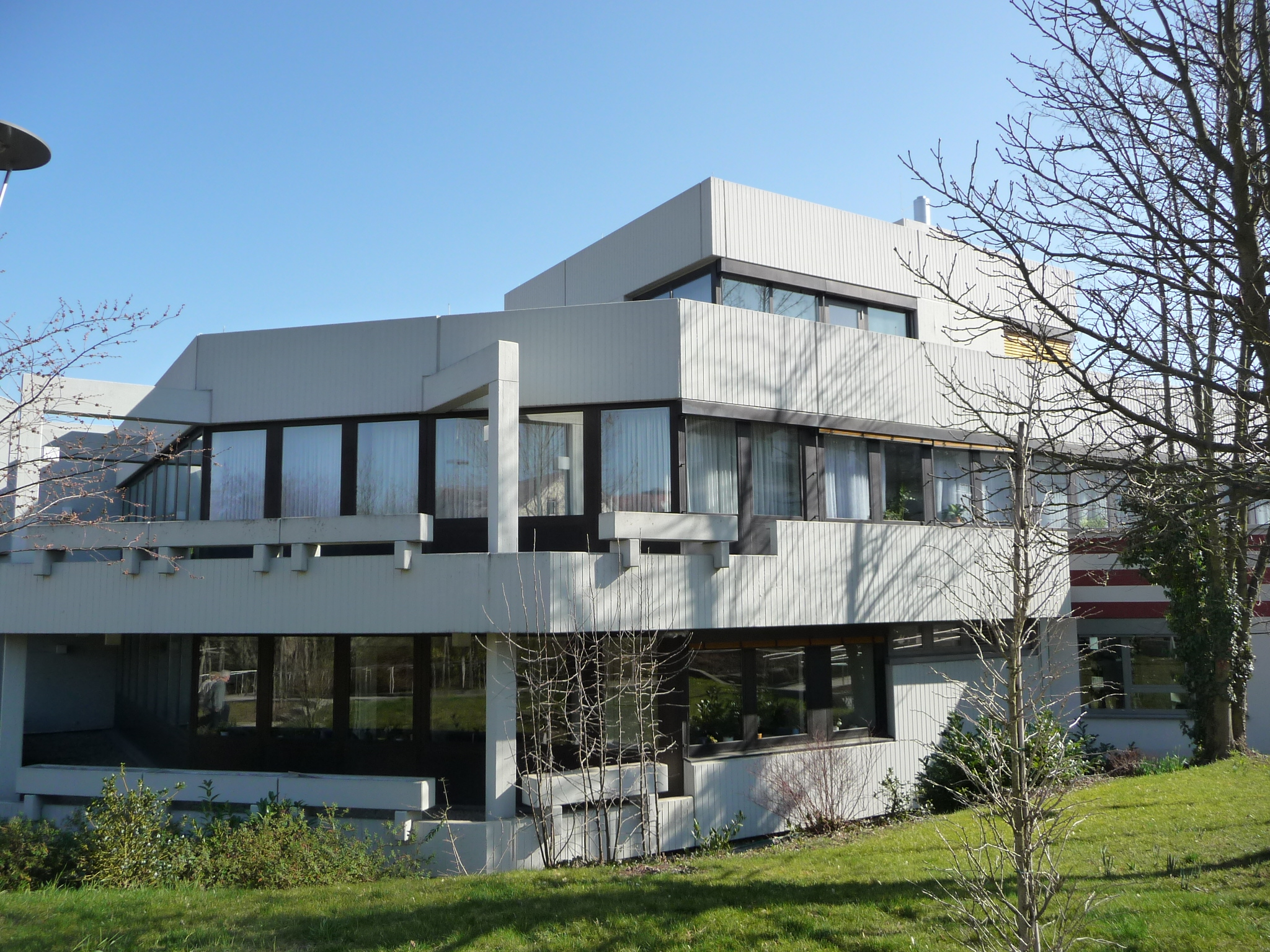 Rathaus in Kirchheimbolanden, Rheinland-Pfalz